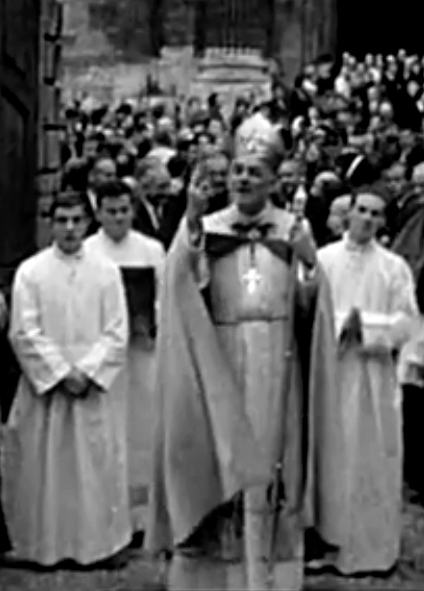 Mgr. Marc-Armand Lallier archevêque de Besançon de 1966-1980